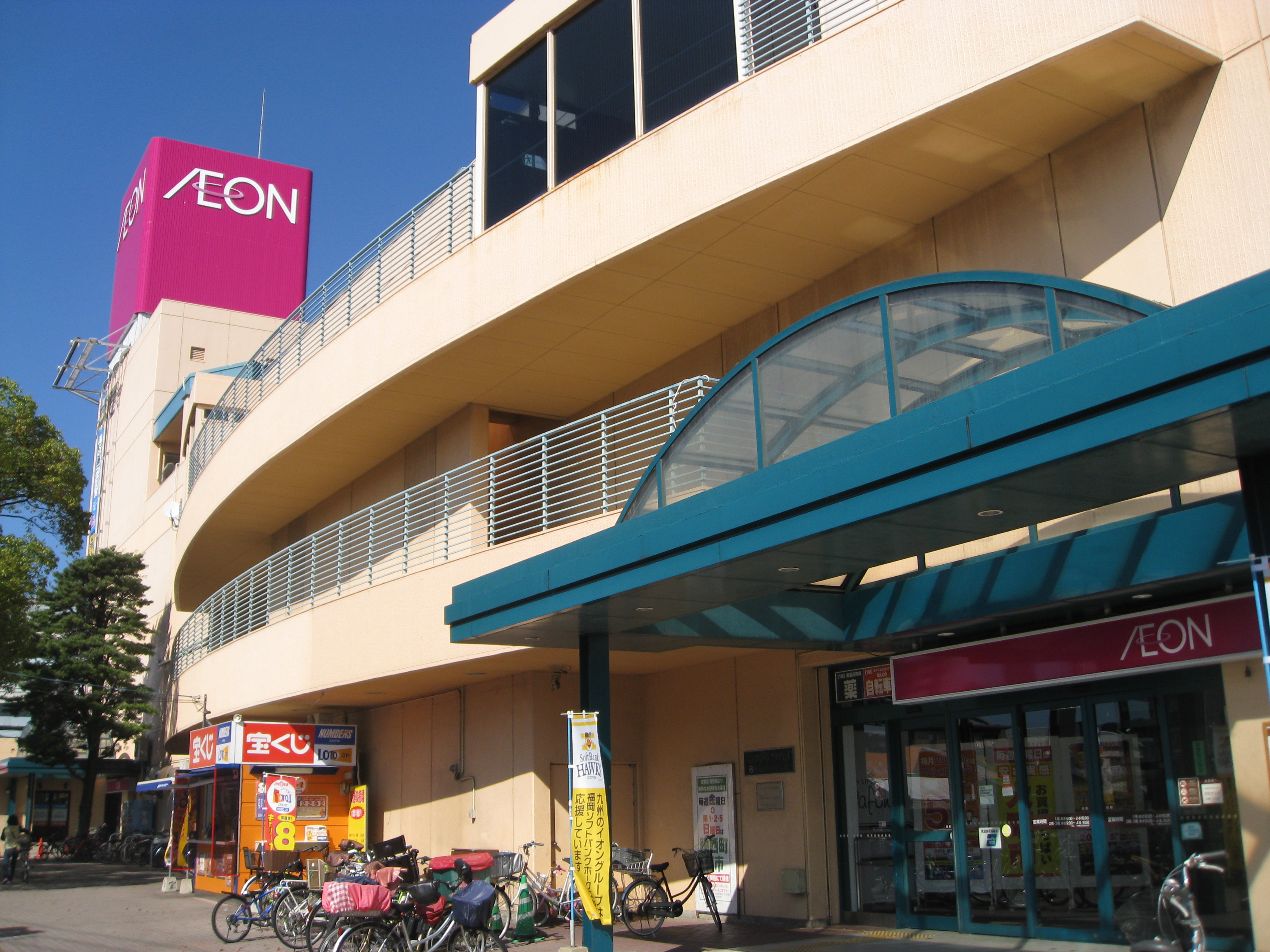 イオン福重店（旧ダイエー福重店）